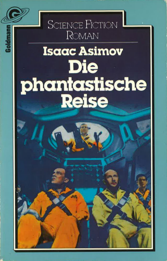 Isaac Asimov: Die phantastische Reise. Goldmann Verlag, München 1983. DNB